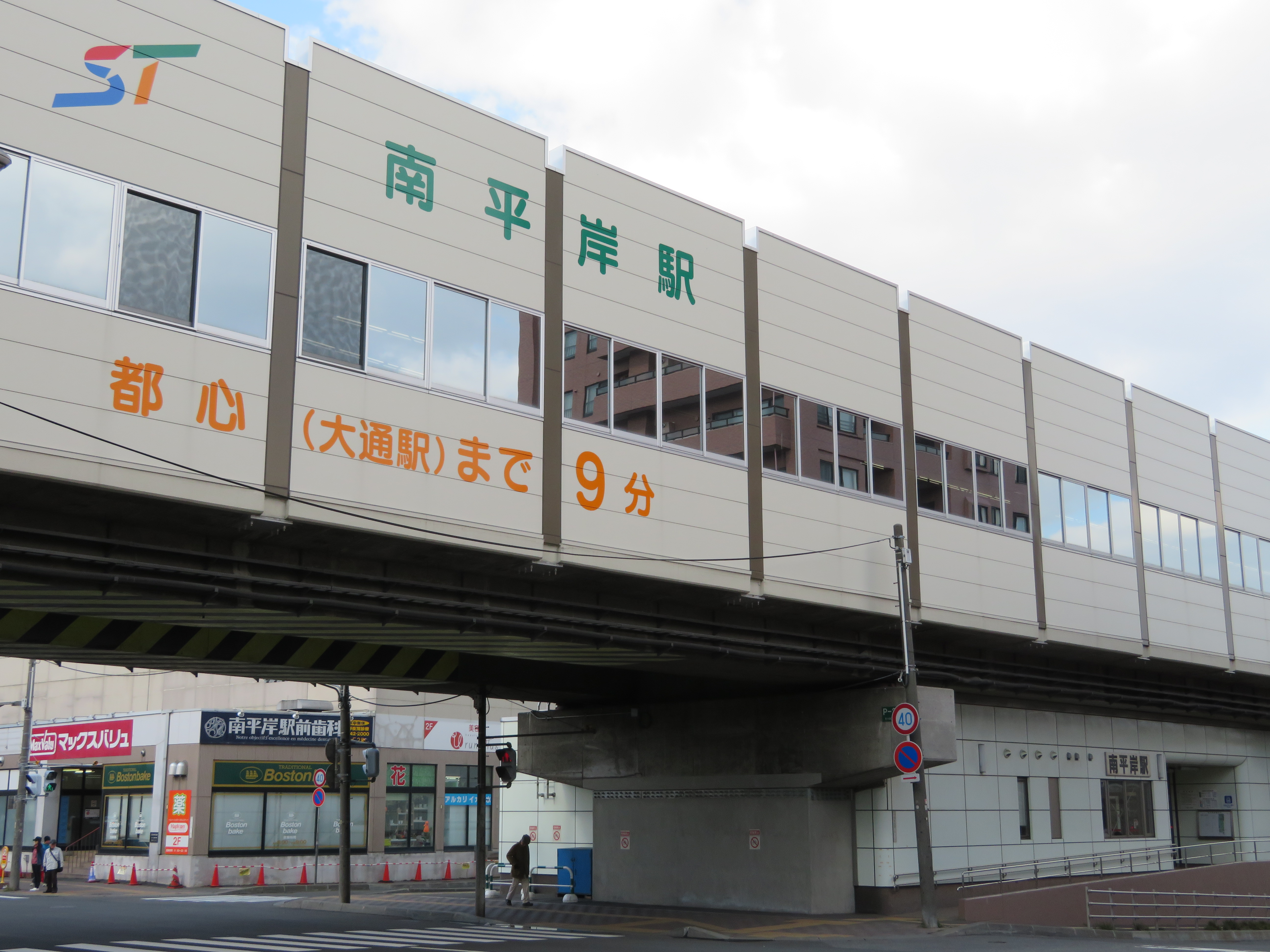 南平岸駅東出入口